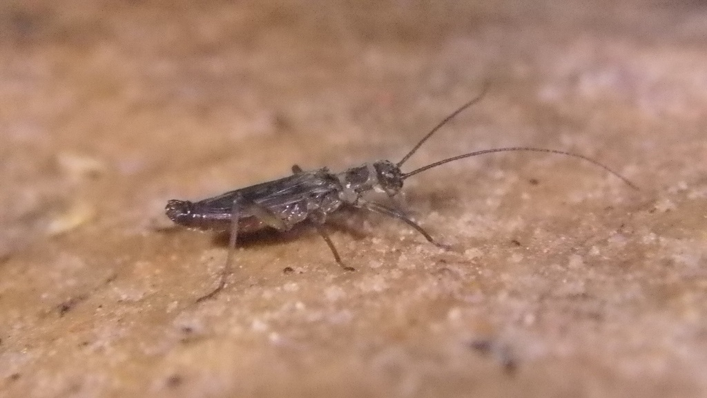 Protonemura gevi male